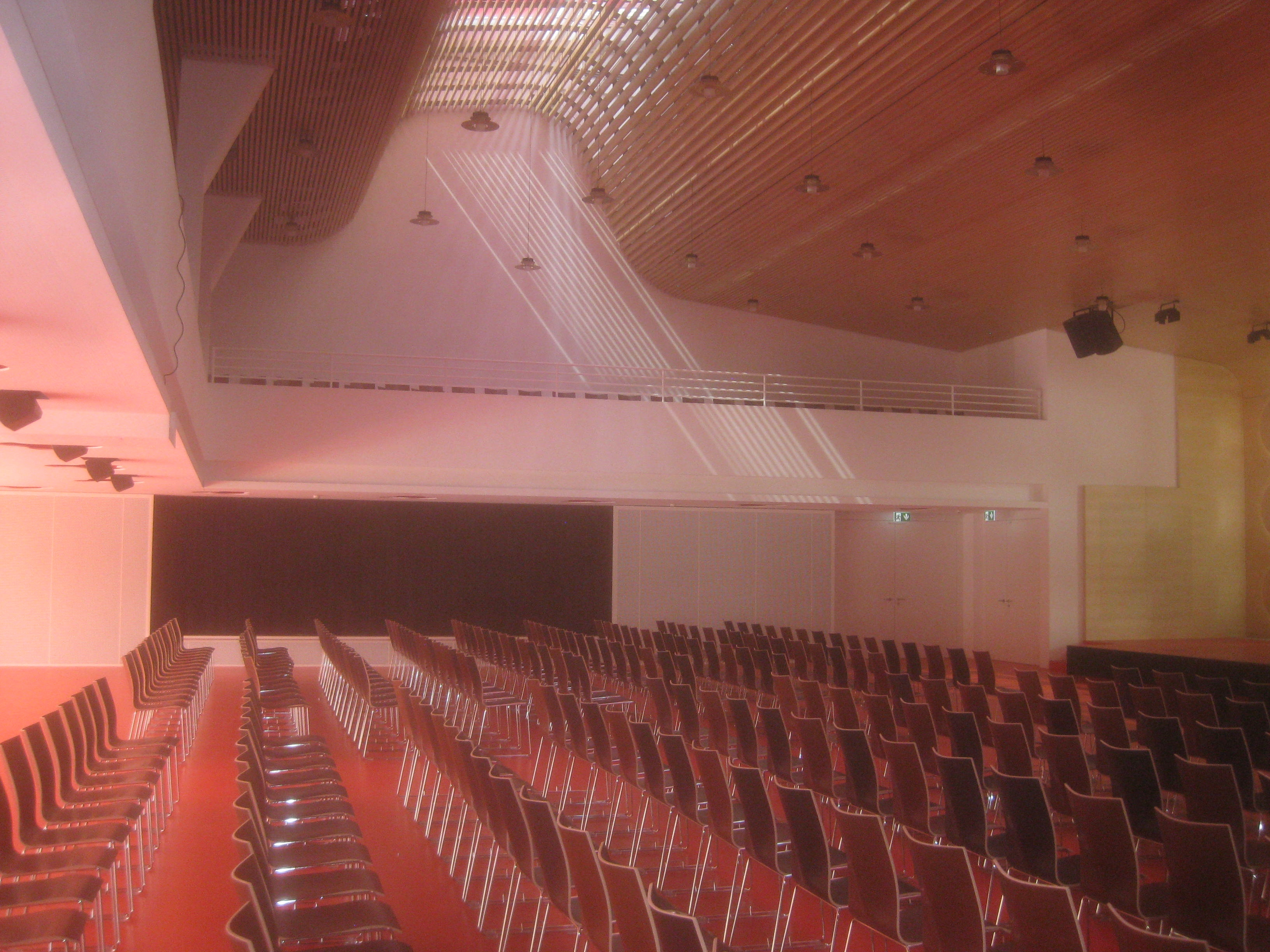 Hospitalhof in Stuttgart, Großer Saal, Blick in den Zuschauerraum mit der Lamellendecke.